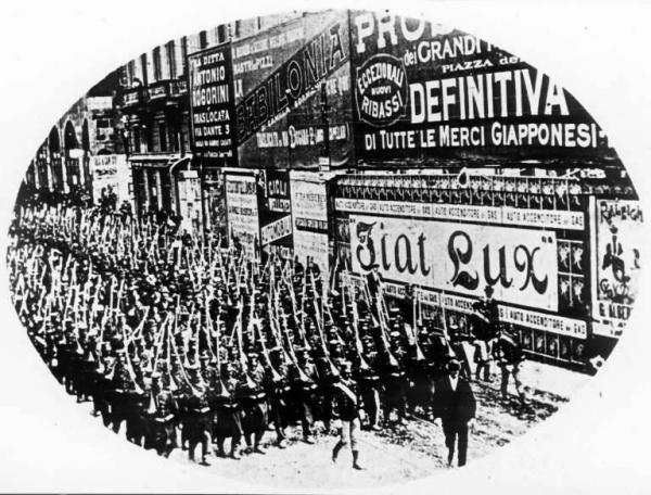 Moti di Milano del 1898, detti anche "Protesta dello stomaco"